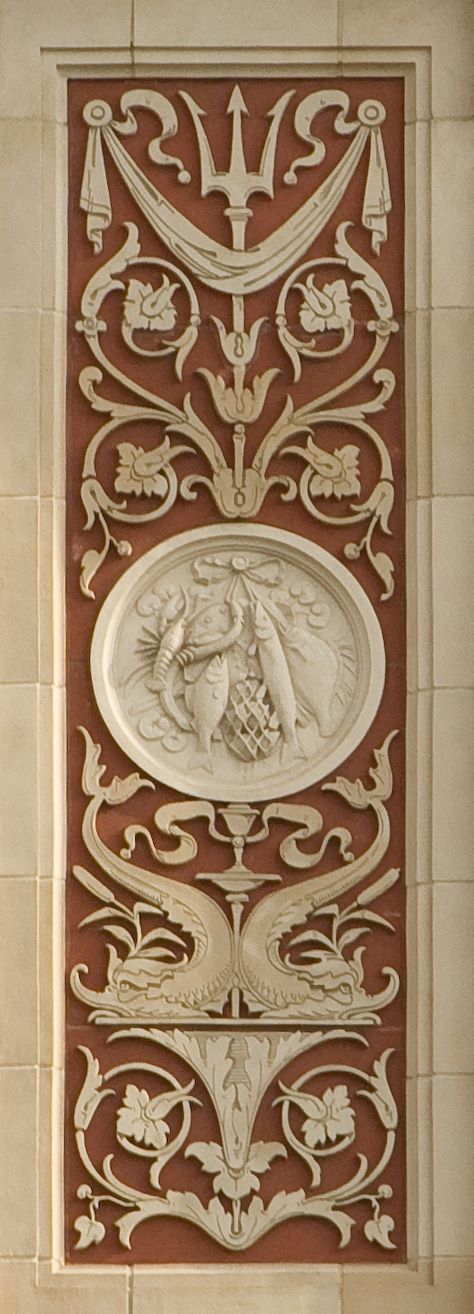 Berlin - Markthalle IV, ehemaliges Vordergebäude an der Dorotheenstraße, Terrakottaplatte Fisch